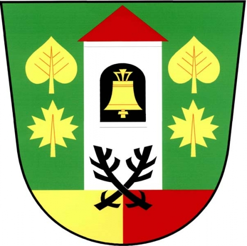 znak, Lesonice, okres Znojmo